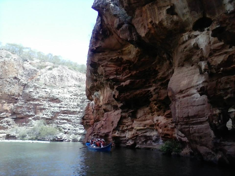 Passeio de barco ao cânion do Xingó -Rio São Francisco